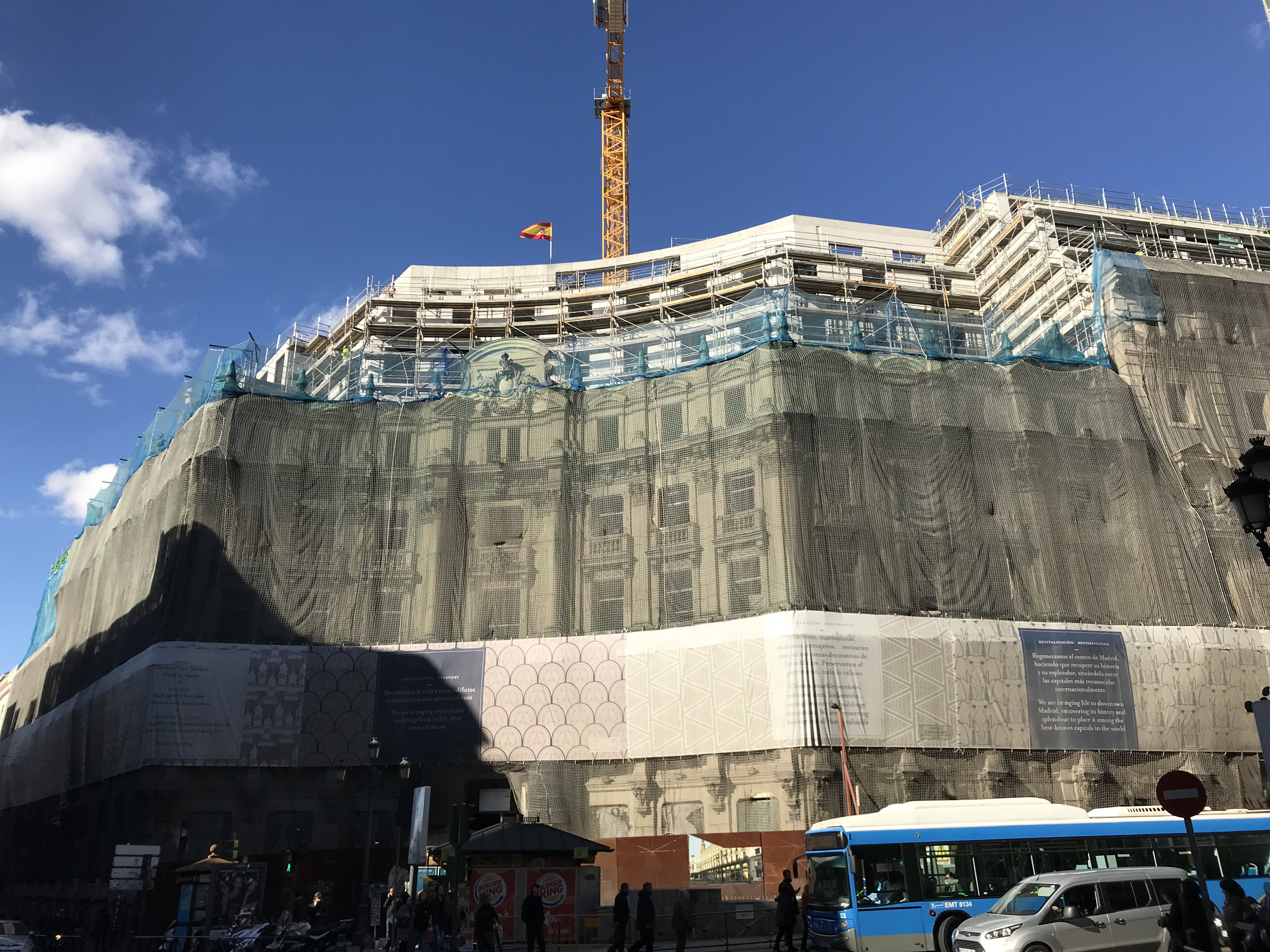 Operación Canalejas, Madrid